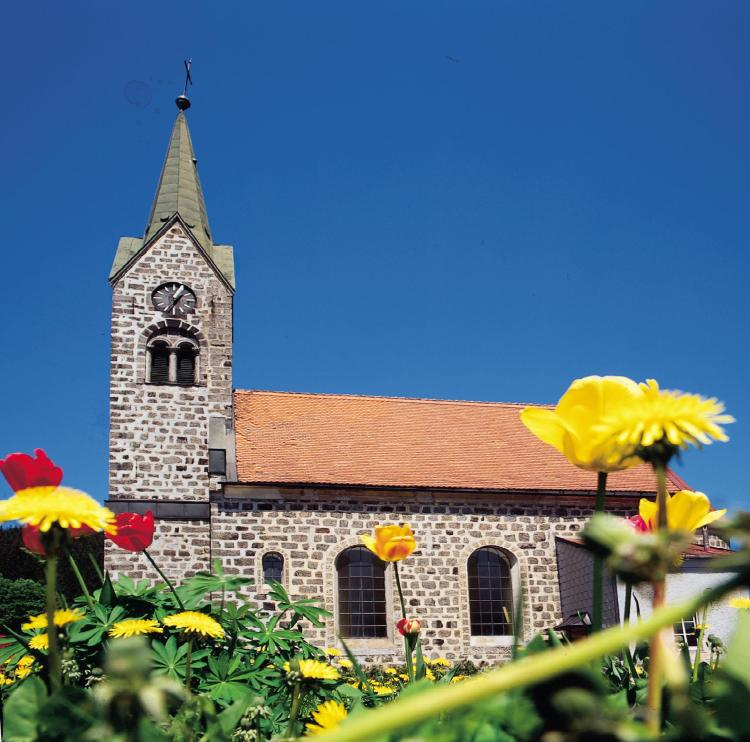 Kath. Filialkirche Schmerzhafte Mutter Gottes